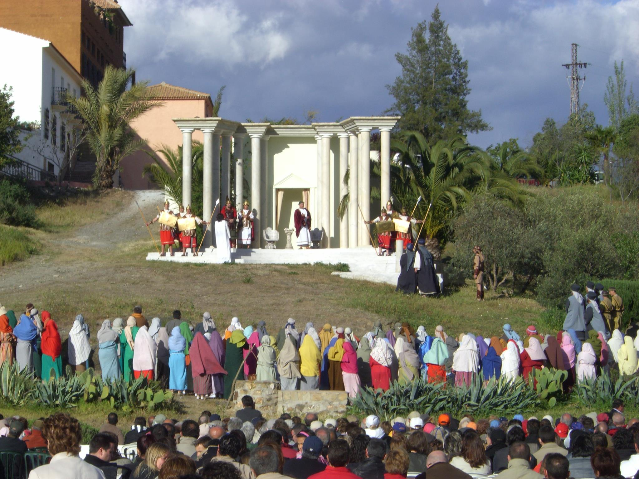 Escena del Juicio ante Pilatos